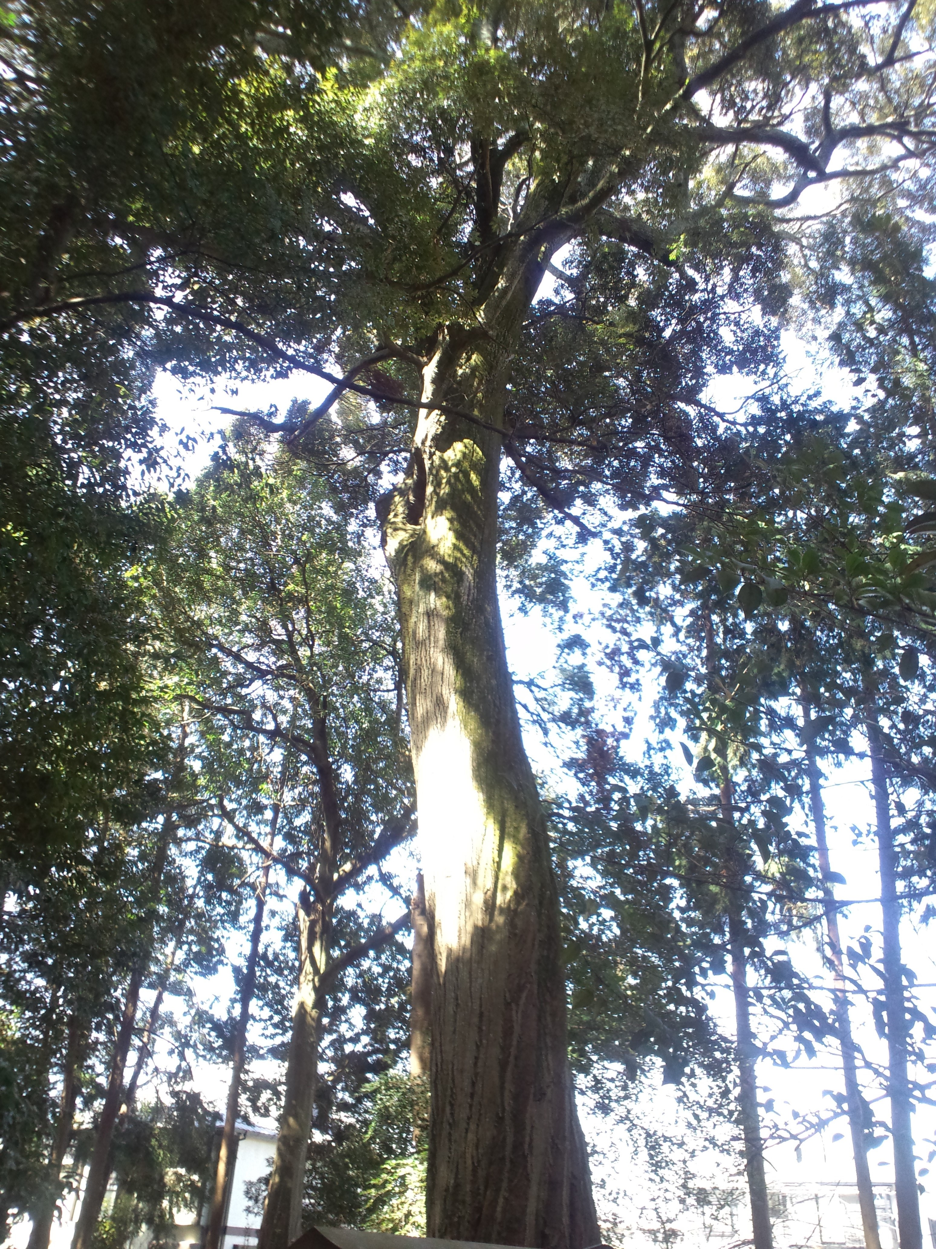 篠村八幡宮 ツブラジイ